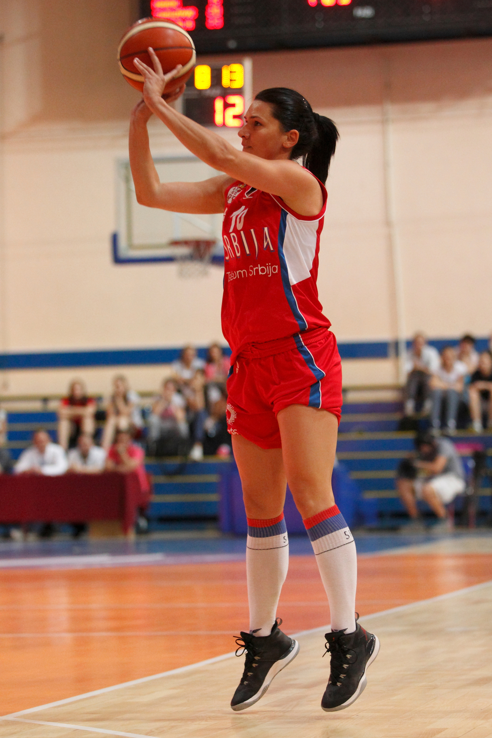 Dajana Butulija, kosarkašica reprezentacije Srbije na trening utakmici protiv Kine u hali Šumice, Beograd, 31.05.2015.